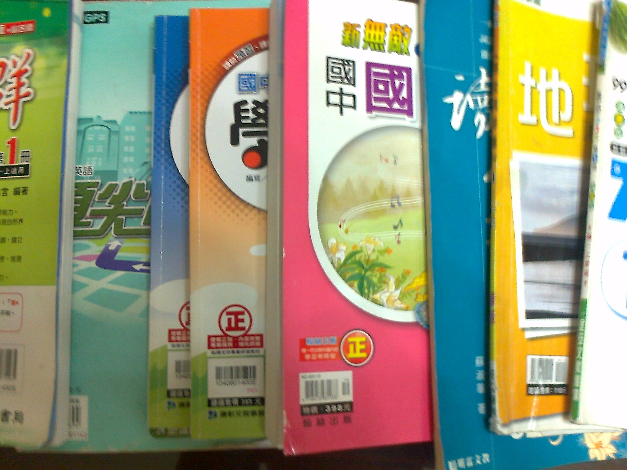 國中的教科書補充教材